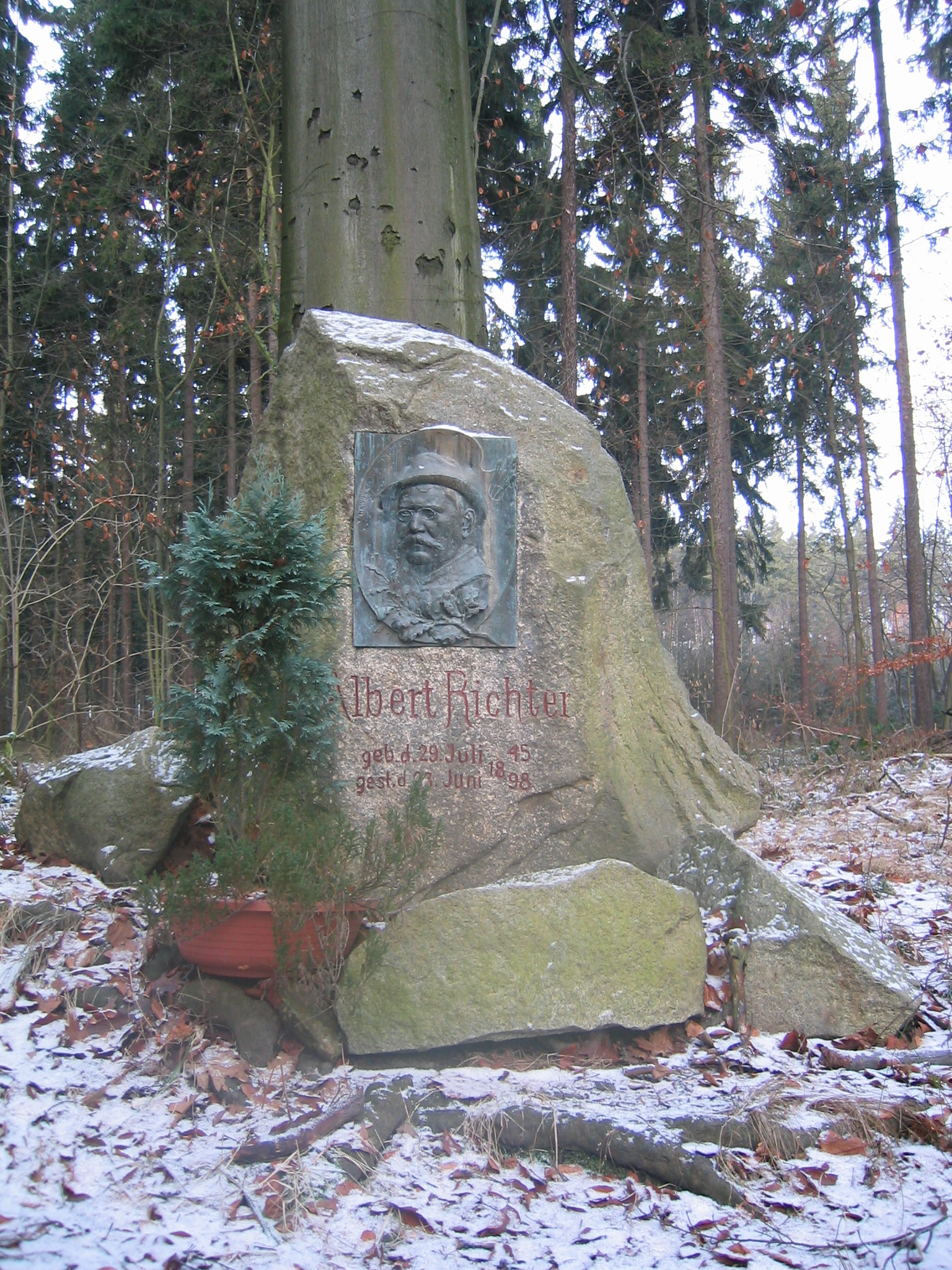 Albert Richter (* 29. Juli 1845 in Dresden; † 23. Juni 1898 in Langebrück) war ein deutscher Landschafts-, Tier- und Jagdmaler. Als Illustrator wurde er vor allem durch seine Arbeiten für Karl May bekannt. Richter besuchte von 1863 bis 1865 die Dresdner Kunstakademie. Nach 1878 zog der er nach Langebrück in die Villa Hubertus. Ab 1893 lebte er wieder in Langebrück bei Dresden. Nach seinem Tod wurde ihm in der Dresdner Heide ein Denkmal errichtet sowie eine Straße in Dresden-Langebrück nach ihm benannt.